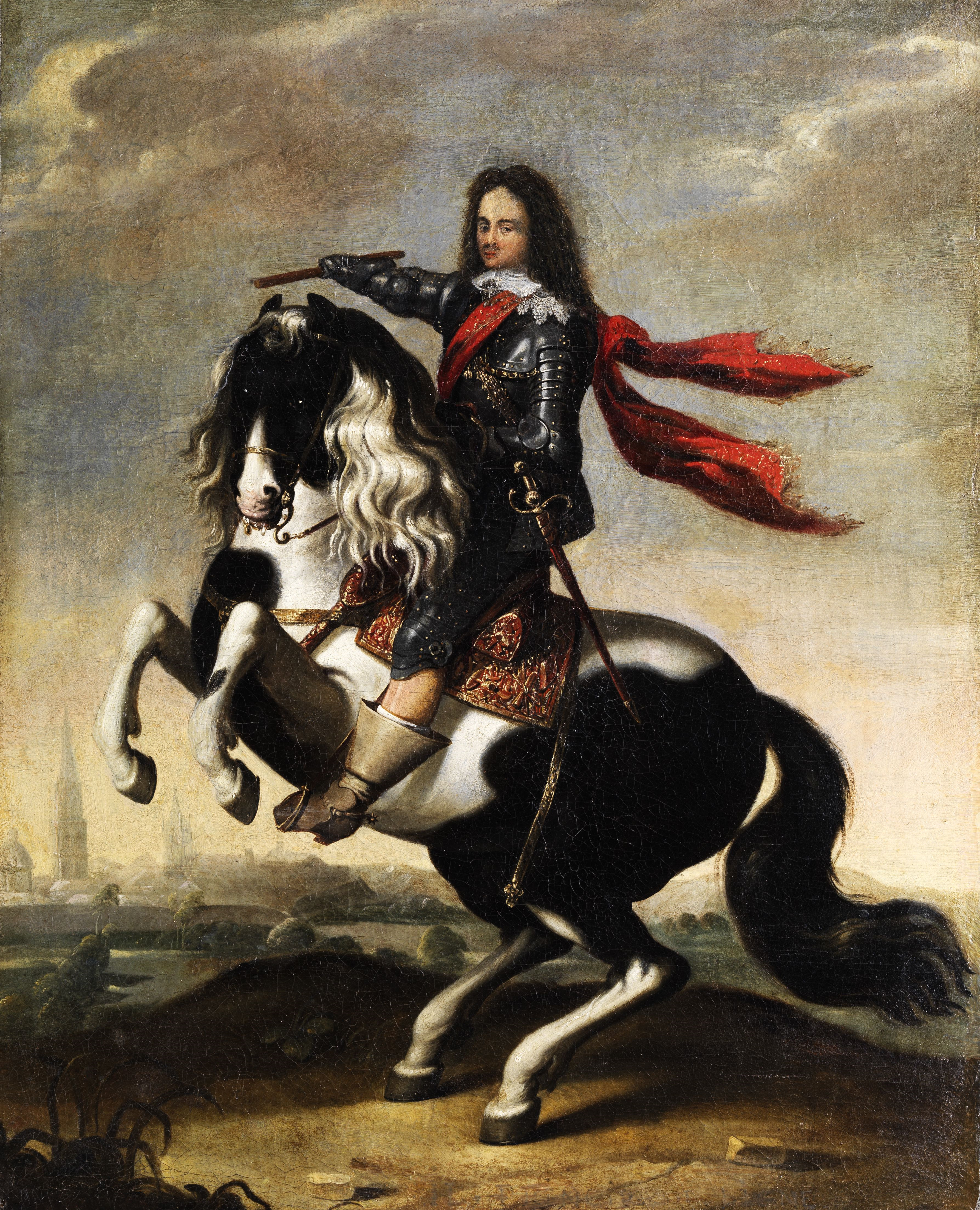 Prinz Waldemar Christian von Dänemark (1622-1656, Sohn König Christians IV.) im Harnisch zu Pferd